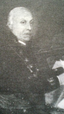 Giuseppe Maria Capodieci - sacerdote, archeologo, annalista, siracusano (1749 - 1828).